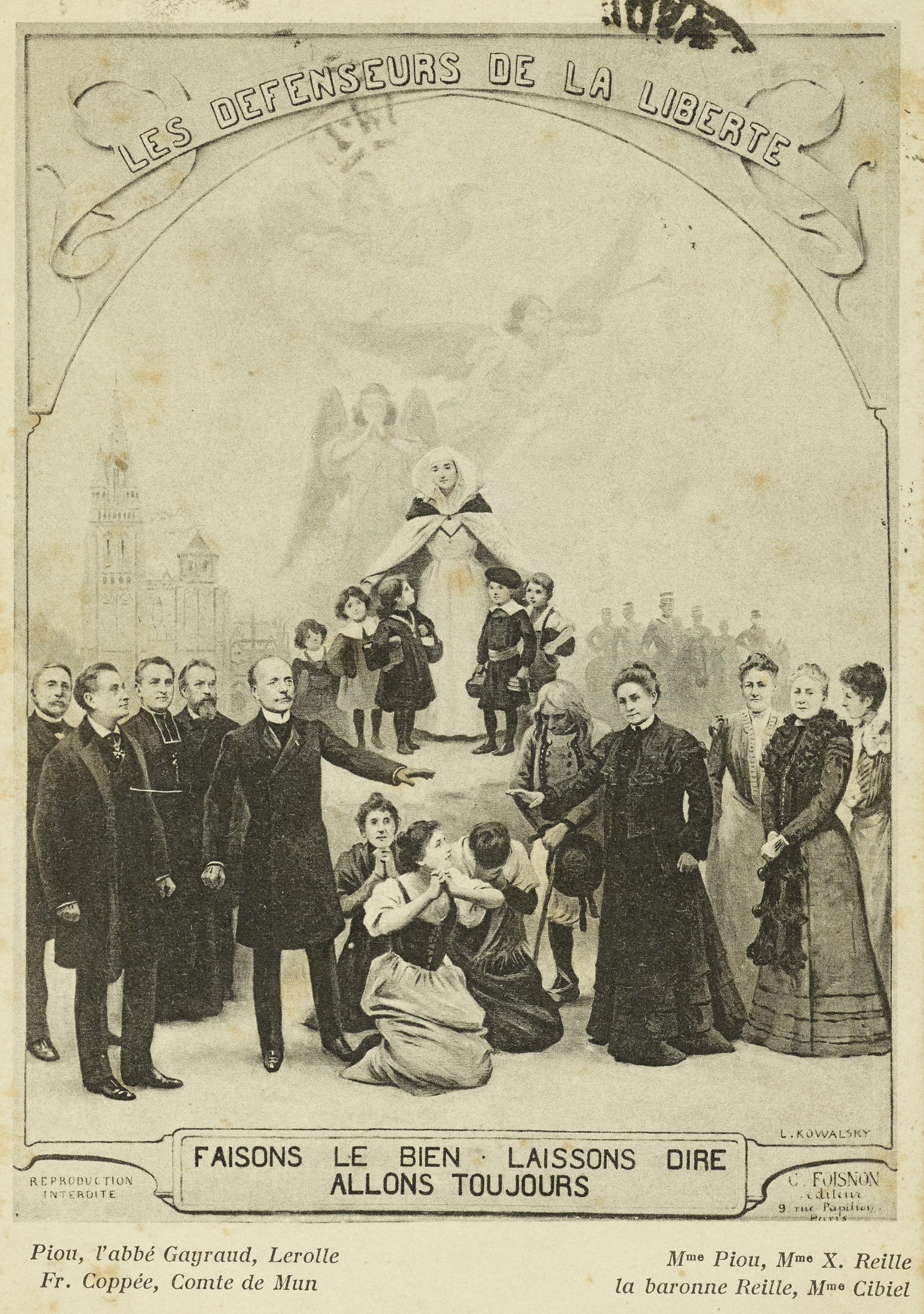 "Faisons le bien laissons dire allons toujours" : Au recto, sous un phylactère portant "Les défenseurs de la liberté", on voit une religieuse (une soeur blanche) prenant sous sa protection 5 jeunes enfants avec en arrière-plan, sur la gauche une église et sur la droite des militaires à cheval. Au premier plan, au centre trois femmes à genou et un Breton en costume debout; de part et d'autre - leurs noms étant légendés sur la marge inférieure - de gauche à droite :"Piou, l'abbé Gayraud, Lerolle, Fr.Coppée, Comte de Mun, Mme Piou, Mme Xavier Reille, la baronne René Reille, Mme Cibiel.En bas de ce tableau, une maxime encadrée "Faisons le bien . Laissons dire . Allons toujours ".